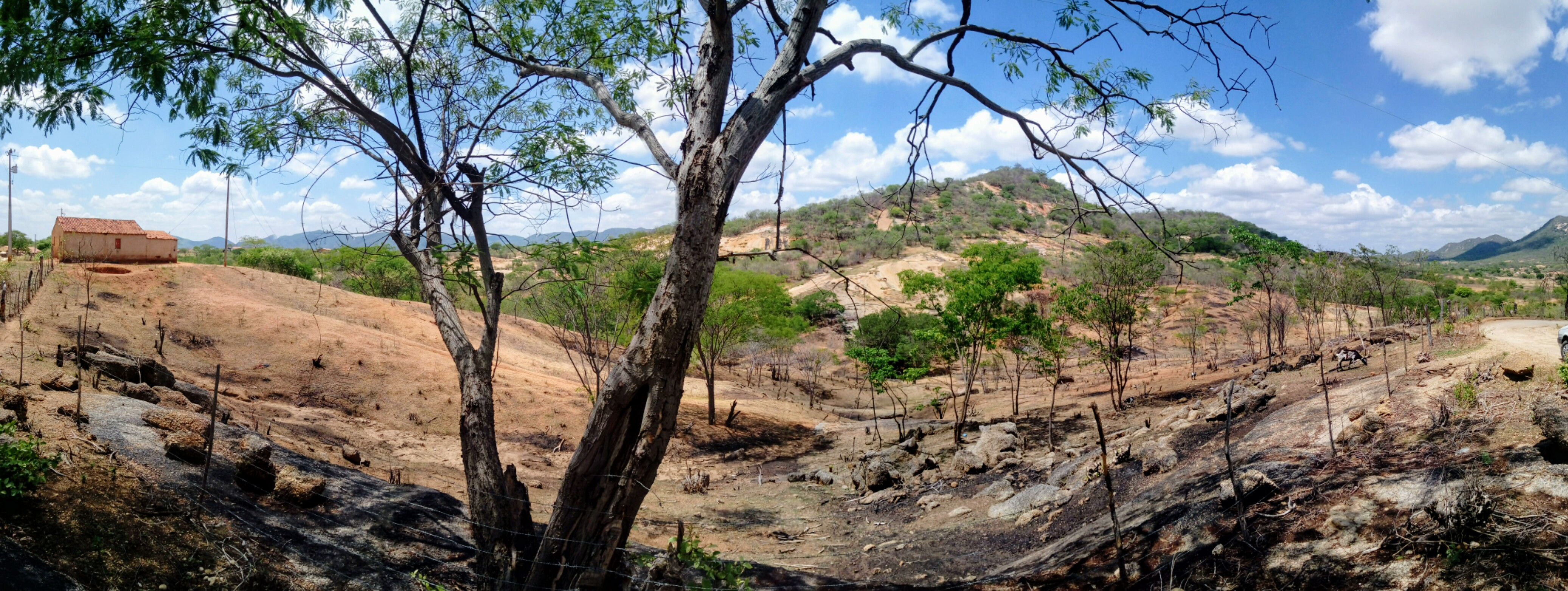 Detalhe da cobertura do solo da caatinga, Sítio Pai João, Lagoa, Paraíba.